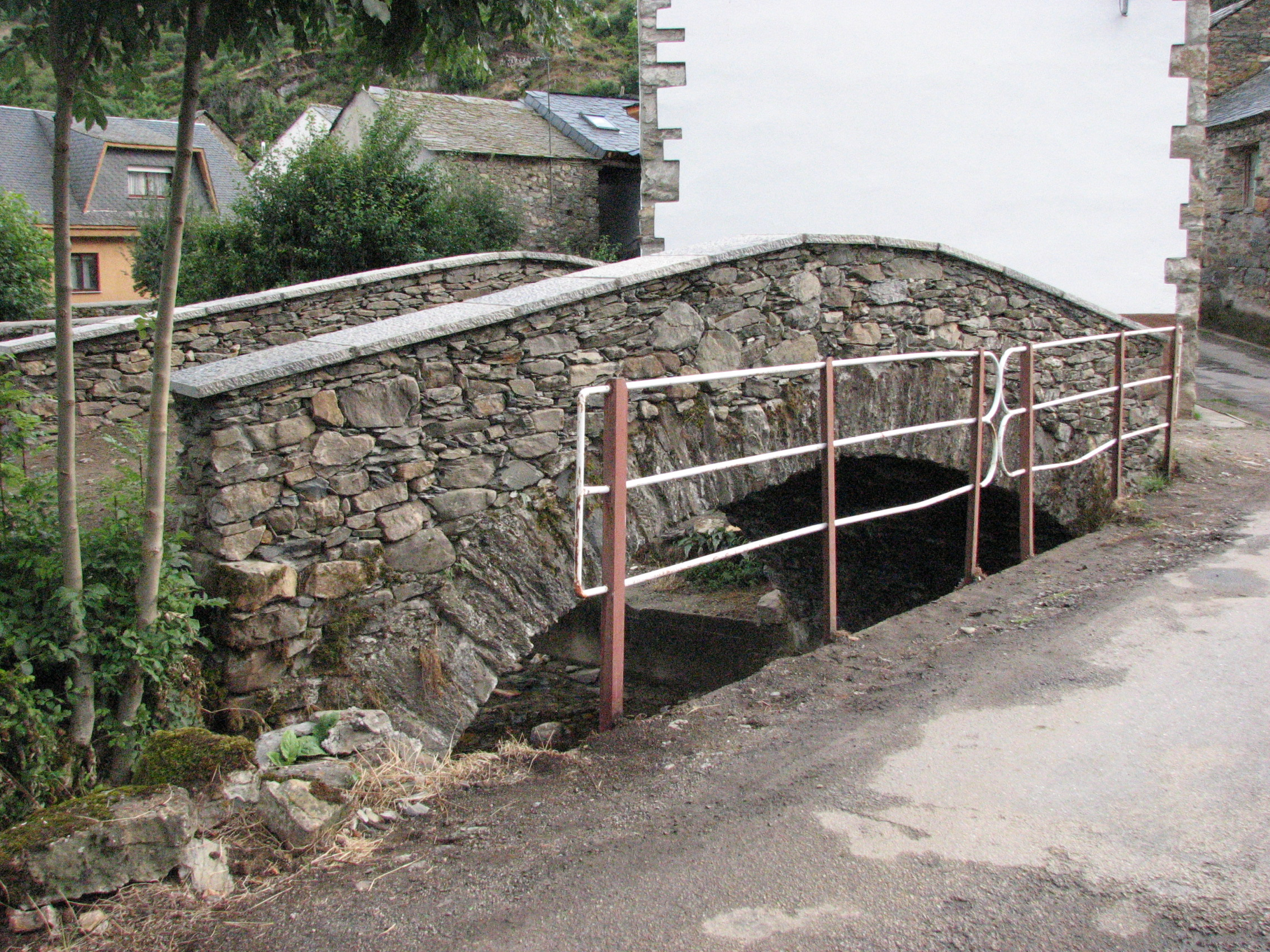 Vegapujín, León, España. Puente Romano.